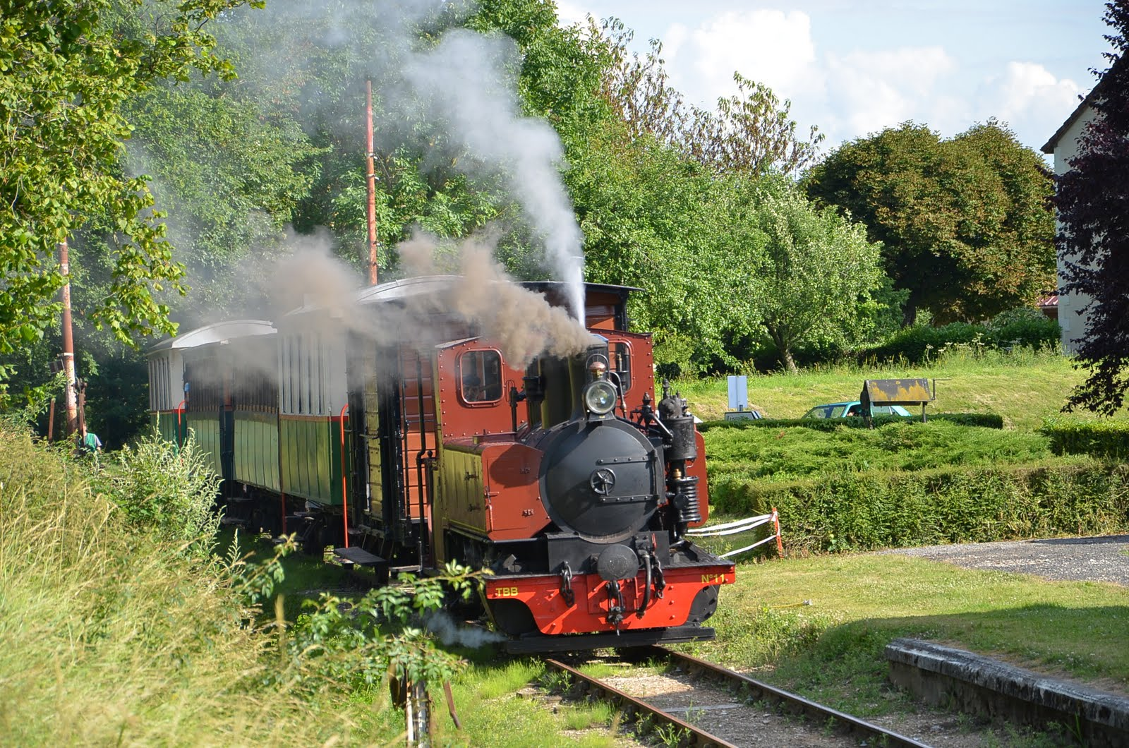 Ecueillé Indre 36240